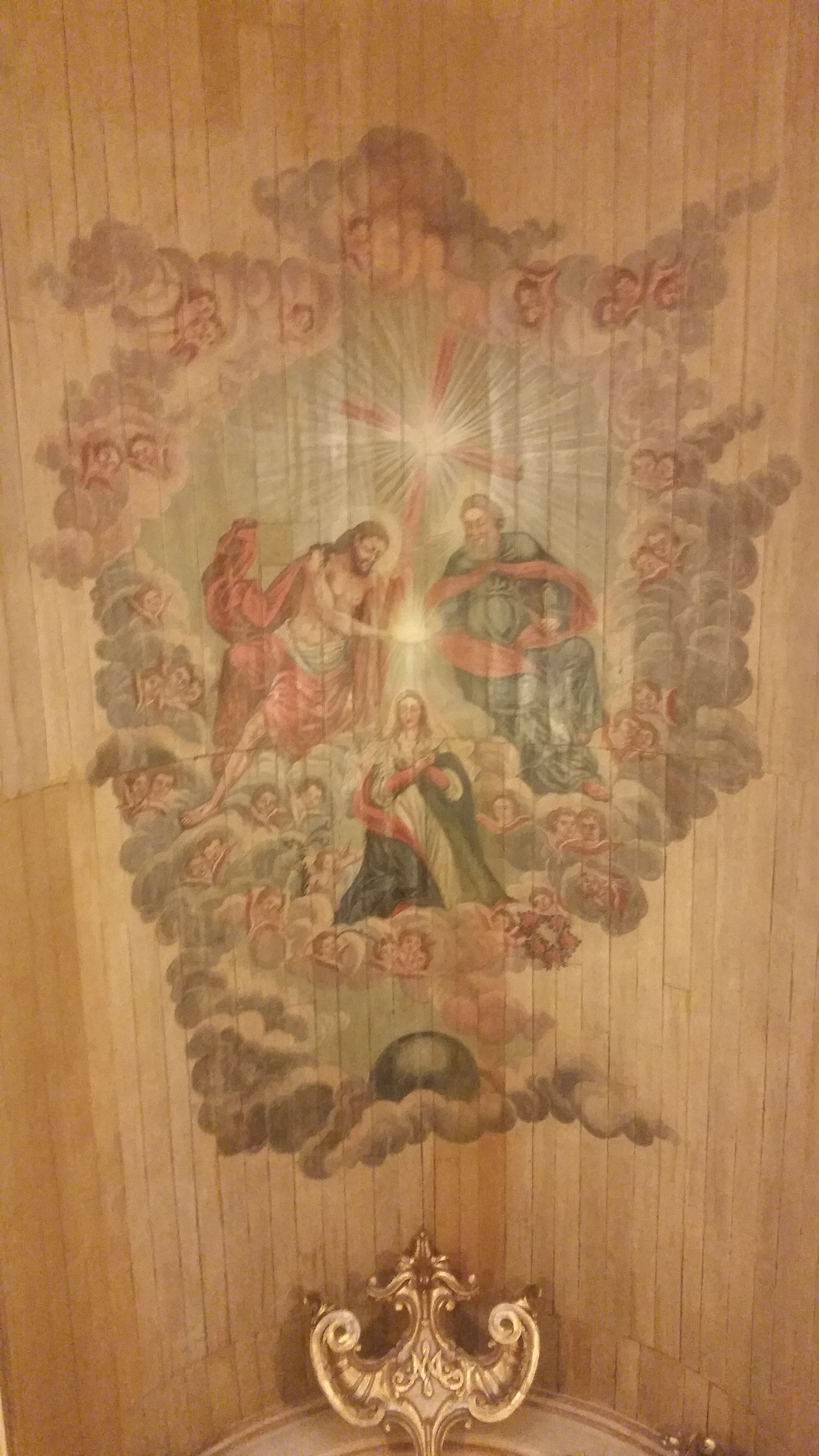 Teto pintado da Igreja Nossa Senhora da Boa Morte, São Paulo (SP)